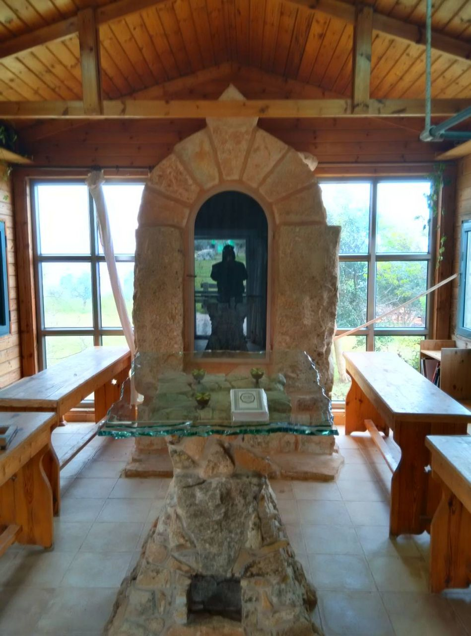 פנים בית הכנסת בגבעות עולם